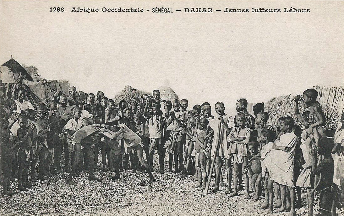 François-Edmond Fortier, Dakar. Jeunes lutteurs Lébous. Afrique Occidentale - Sénégal.